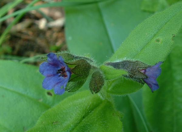 Pulmonaire des montagnes , photo J.F. Gaffard, Bucey_lès-Gy, juin 2004